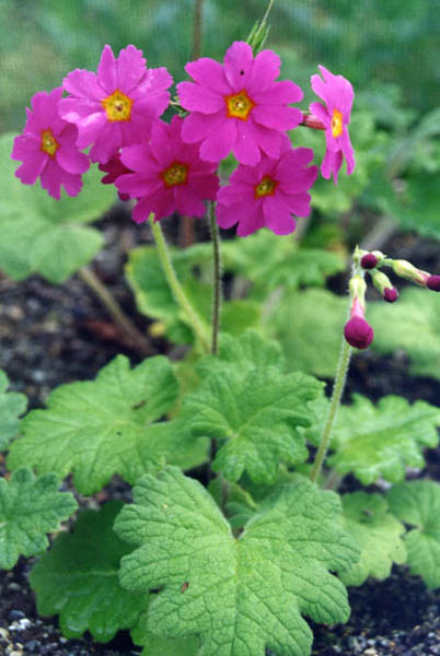 Primula heucherifolia